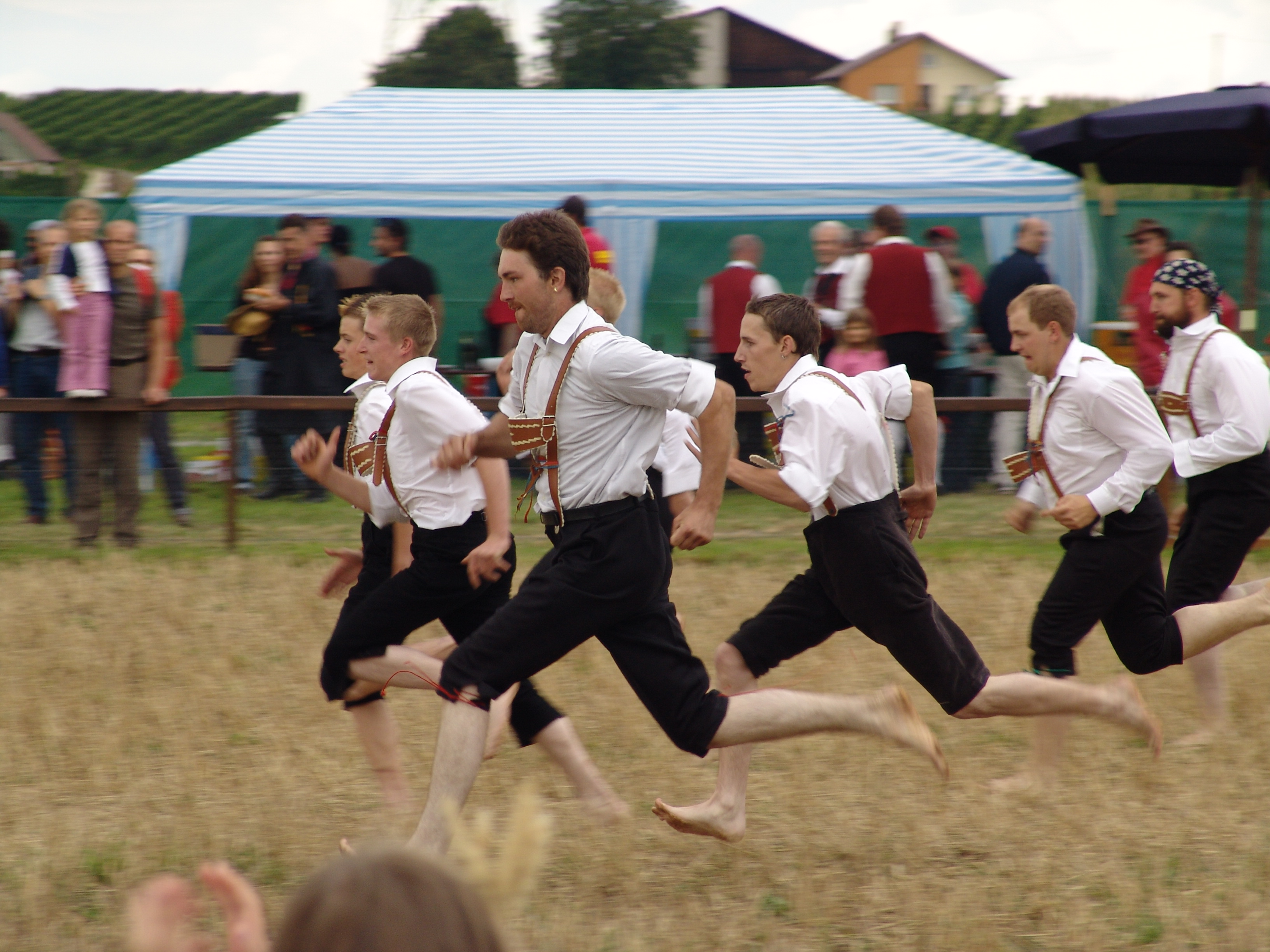 Schäferlauf in Markgröningen 2006